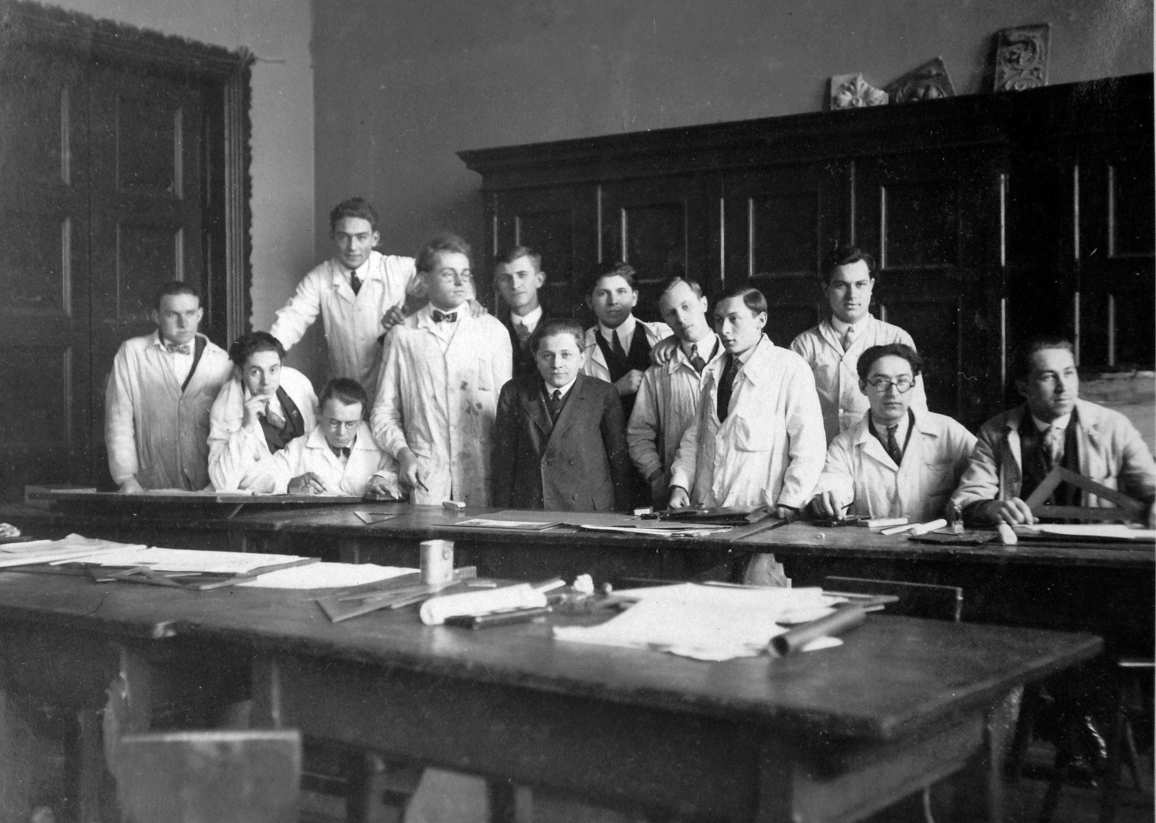 Iparművészeti Múzeum Kinizsi utcai szárnya, Országos Magyar Királyi Mintarajziskola és Rajztanárképző tanterme. Középen köpeny nélkül Kaesz Gyula építő iparművész, bútortervező. Location: Hungary, Budapest IX. Tags: tableau, Budapest Title: Iparművészeti Múzeum Kinizsi utcai szárnya, Országos Magyar Királyi Mintarajziskola és Rajztanárképző tanterme. Középen köpeny nélkül Kaesz Gyula építő iparművész, bútortervező.